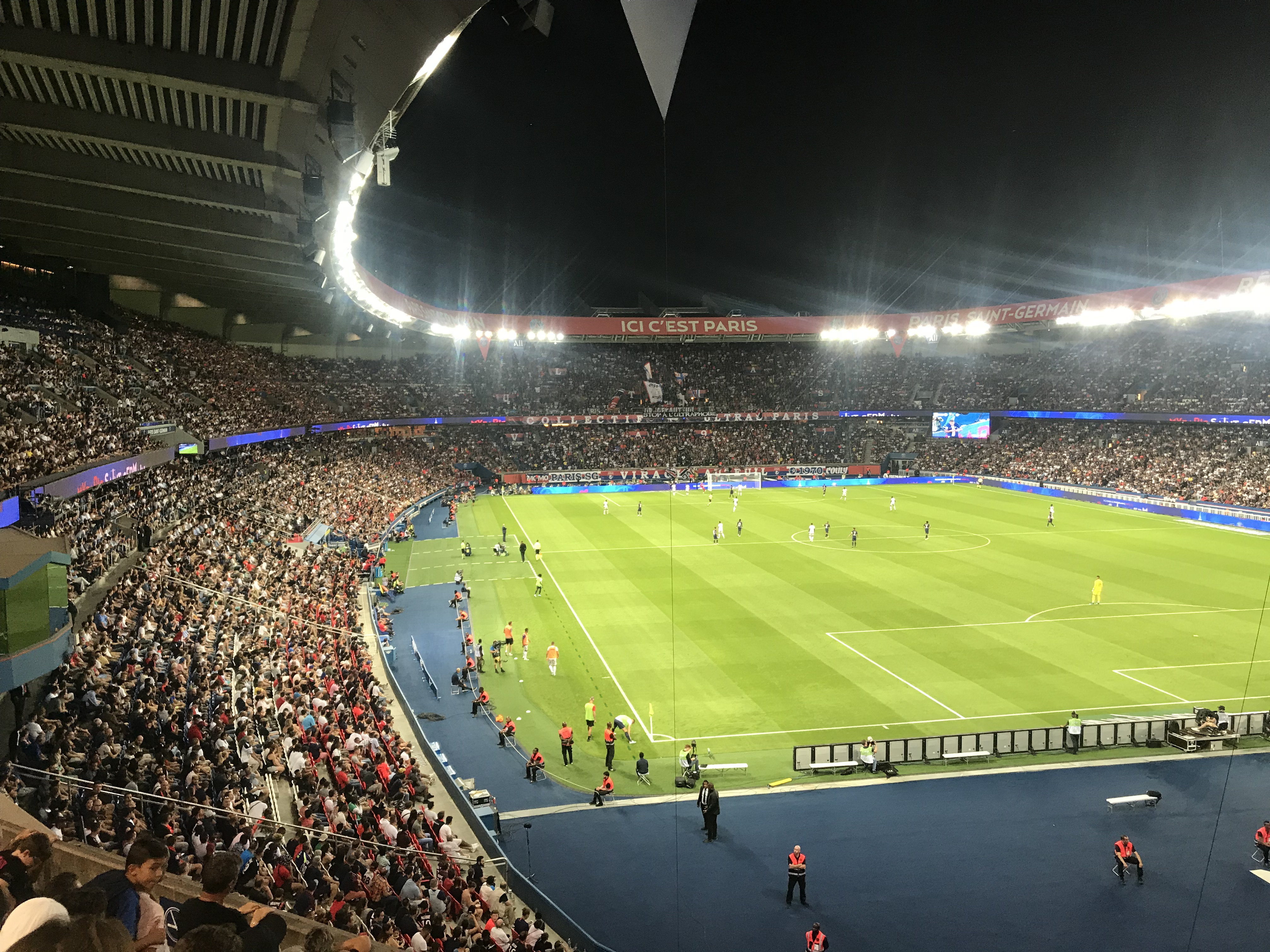 PSG-Toulouse Championnat de France Parc des Princes